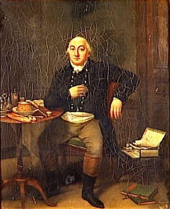 Godefroy de Romance, marquis de Mesmon (1745–1831) à mi-corps, collation, boisson, table, vaisselle, pain